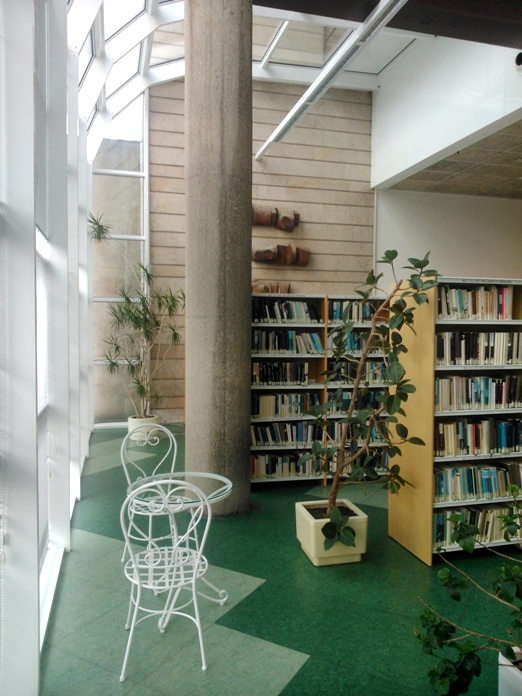 Servicio de Préstamo de Adultos de la Biblioteca Pública Municipal Bances Candamo (Avilés, Asturias).